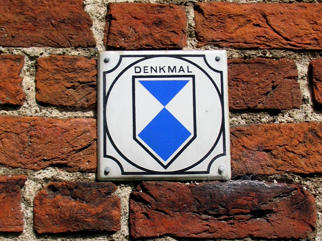 Kennzeichnung von Baudenkmalen nach der 1980 erlassenen Dritten Durchführungsbestimmung zum Denkmalpflegegesetz der DDR (1975) an der Kirche St. Nikolai in Richtenberg. Im Osten Deutschlands ist dieses Zeichen daher weit verbreitet und bekannt. Neuerdings werden solche Plaketten in Berlin durch das Landesdenkmalamt wieder ausgegeben. Im Westen, so etwa in Bayern, findet man das in der Mitte enthaltene Signet in seiner ursprünglichen Funktion: Gemäß der Haager Konvention zum Schutz von Kulturgut bei bewaffneten Konflikten (1954) wird so entsprechendes Kulturgut gekennzeichnet.